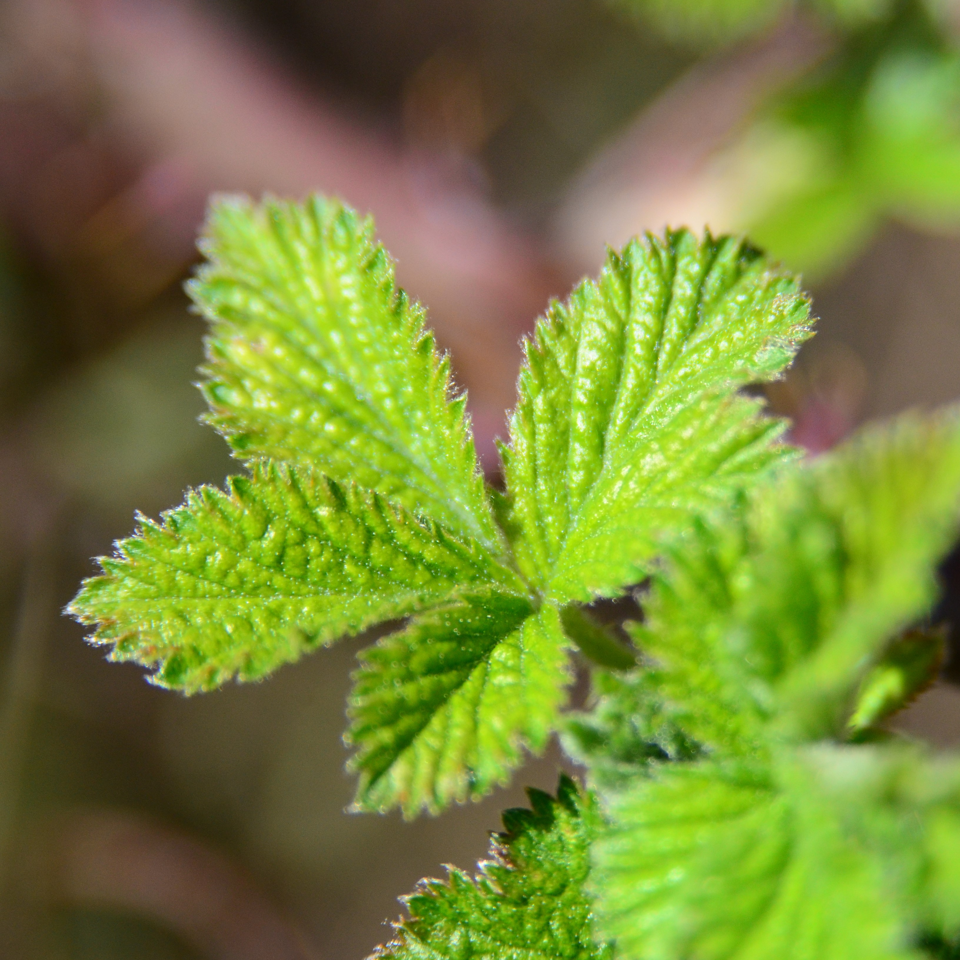 Aufgenommen im März in Plüderhausen